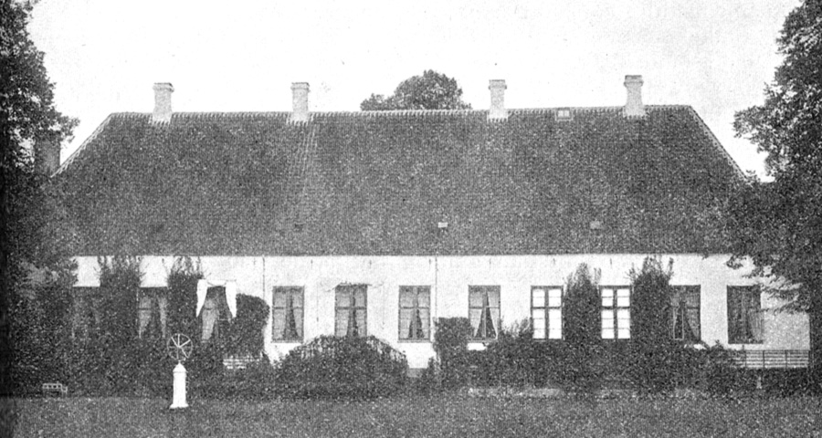 Brobygård har sin oprindelse som landsbyhovedgård i det 14. århundrede, men det er først i slutningen af det 16. århundrede at Brobygård kom frem i historien igen. Gården er nu en avlsgård under Arreskov Gods. Brobygård ligger i Sønder Broby Sogn, Sallinge Herred, Broby Kommune. Hovedbygningen er opført i 1662-1673, tilbygget i 1769 og er igen tilbygget i 1905 v